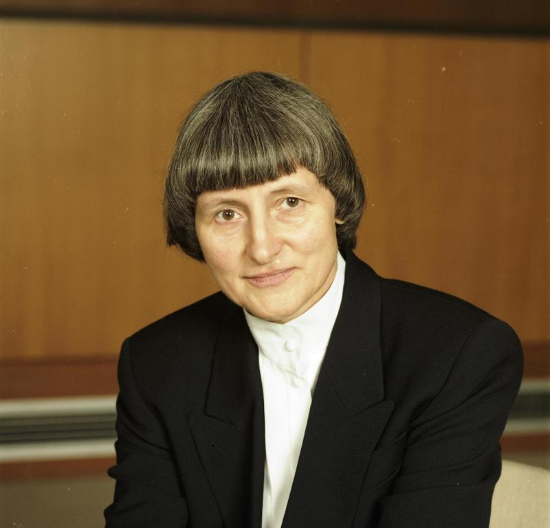 18.12.1989 Helga Seibert, Richterin am Bundesverfassungsgericht I. Senat